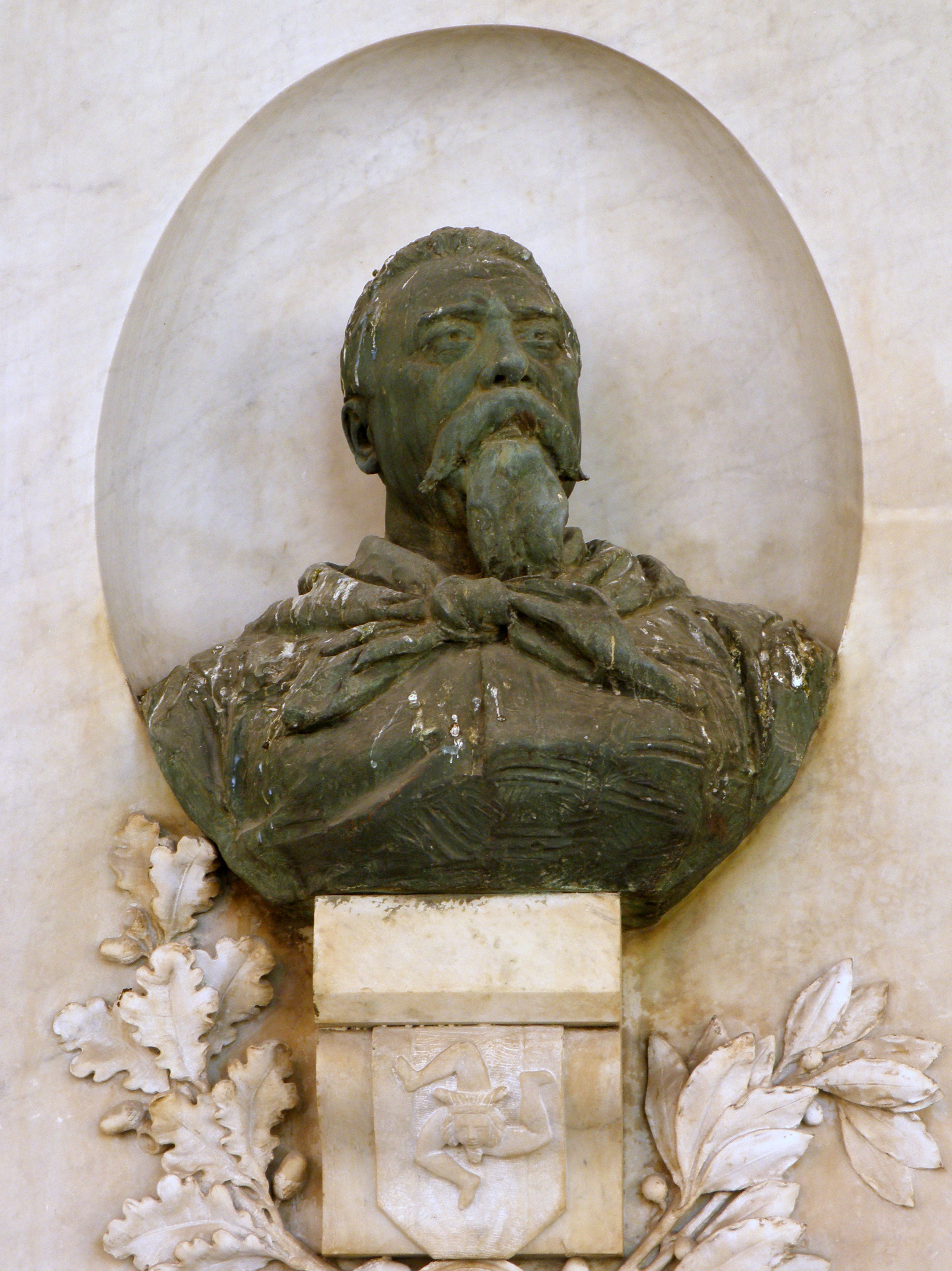 Rovigo, palazzina del Corpo di Guardia: dettaglio del busto inserito nella lapide commemorativa dedicata al Generale Domenico Piva, di Augusto Sanavio.